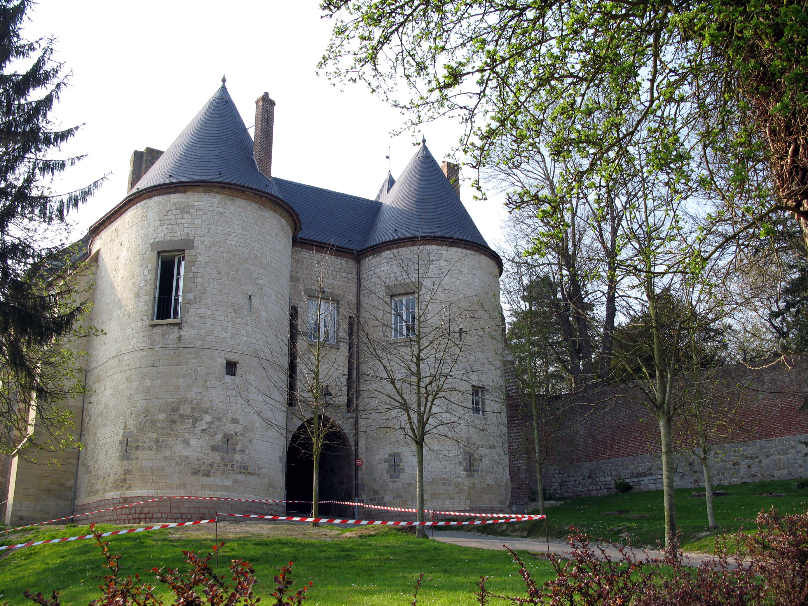 Lucheux (Somme, France) - L'entrée du château. . . .